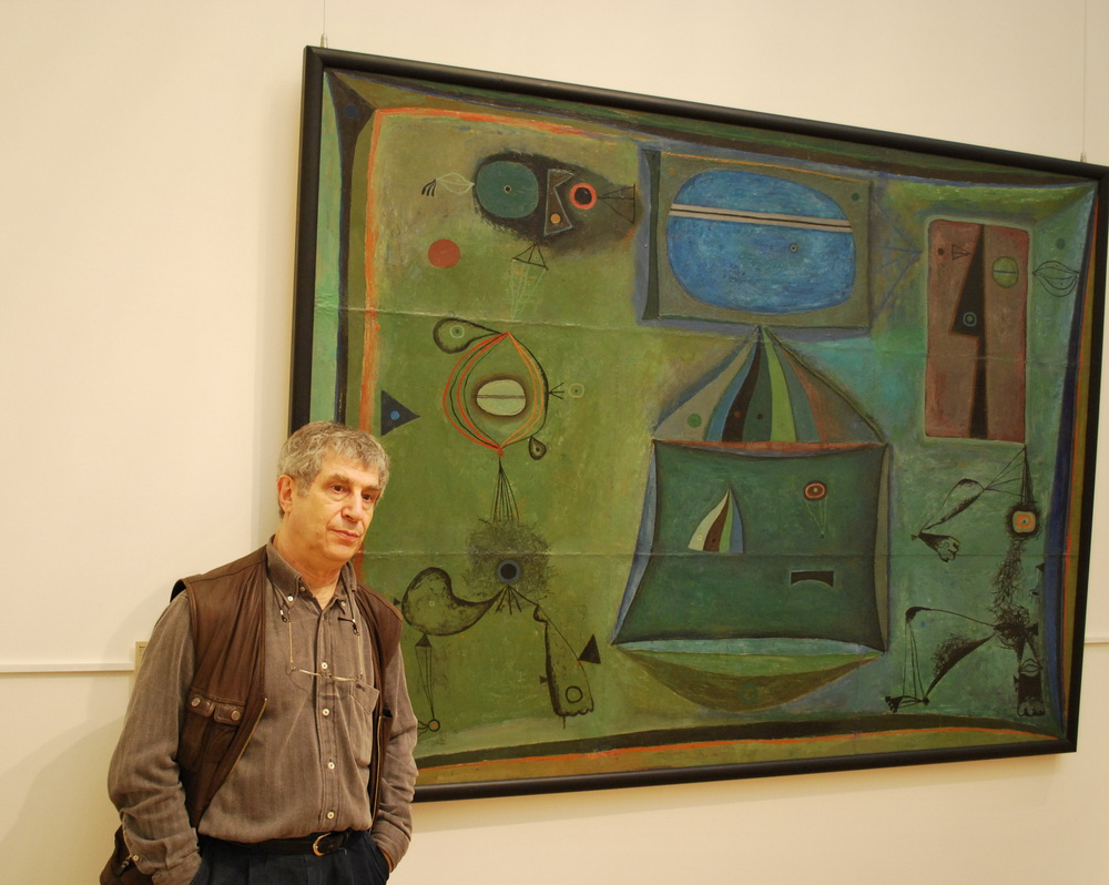 Владимир Янкилевский на фоне своей картины в Третьяковской галерее. Москва. Апрель 2010 года.